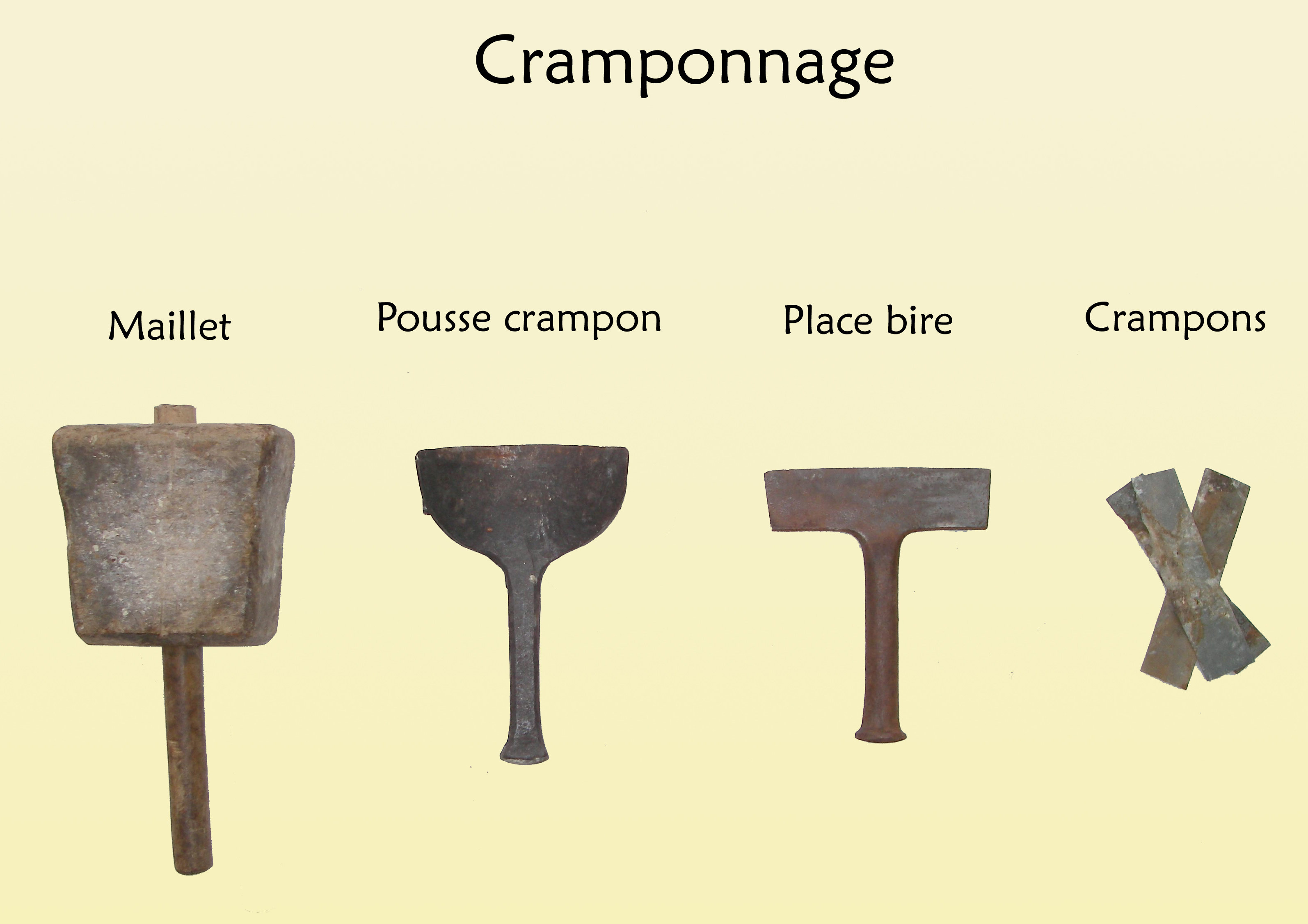 Les outils du gemmeur